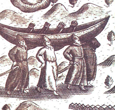 Переноска лодки-струга русскими промысловиками. Фрагмент карты окрестностей Колы из «Путешествия» голландского путешественника Якоба фон Гемскерка.